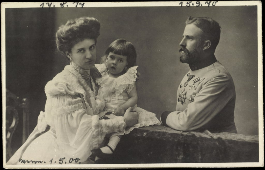 Príncipe Luís Gastão de Saxe-Coburgo e Bragança (1870-1942)